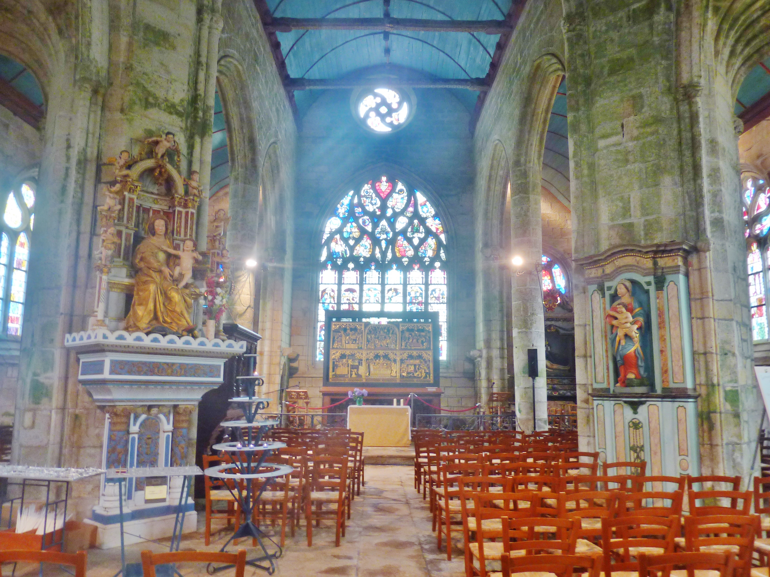 Ergué-Gabéric : chapelle Notre-Dame-de-Kerdévot, vue intérieure d'ensemble